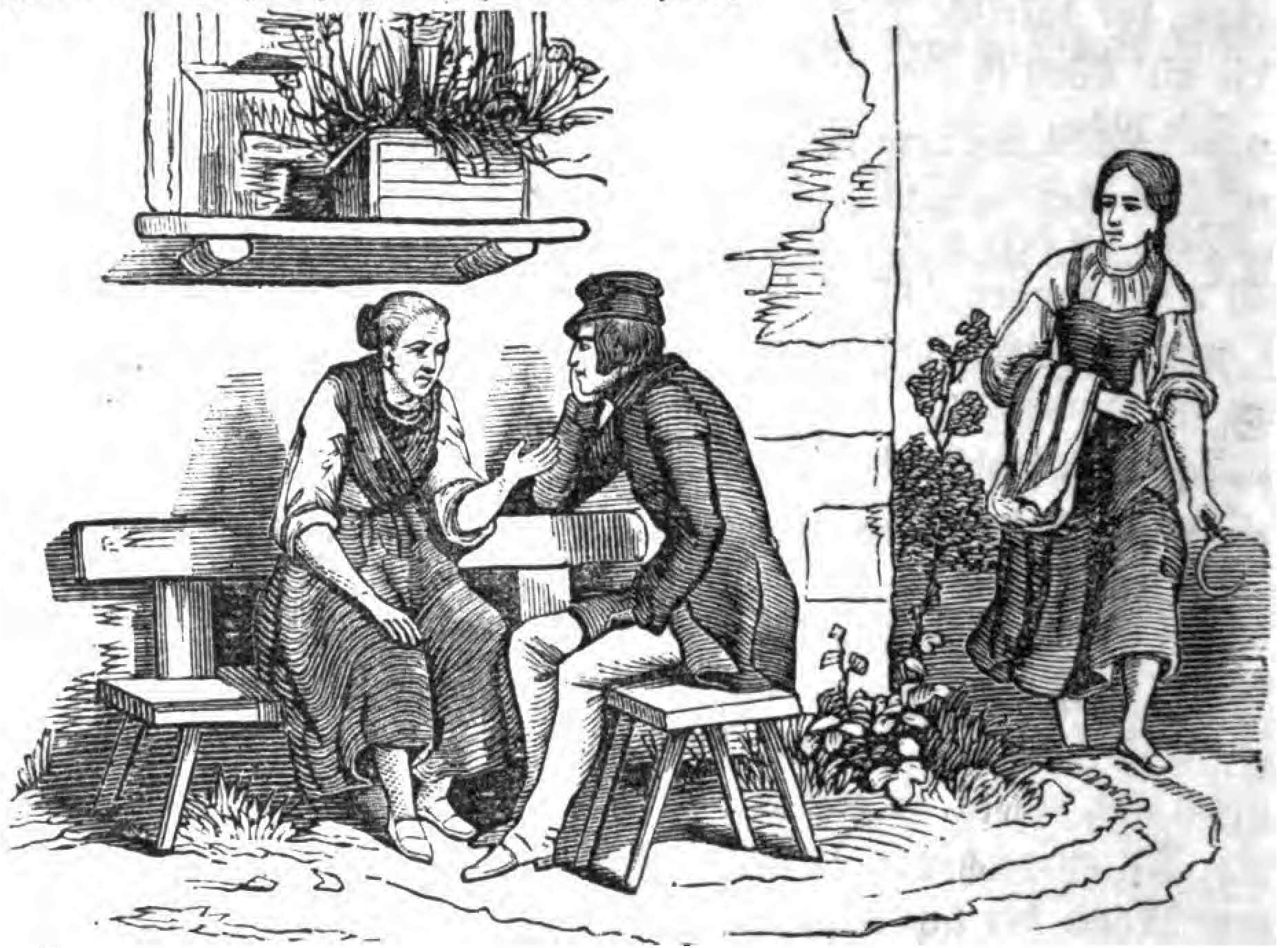 Berthold Auerbach, Schwarzwälder Dorfgeschichten, Der Lauterbacher. – „Nicht wahr, es ist ein sauber’s Mädle?“